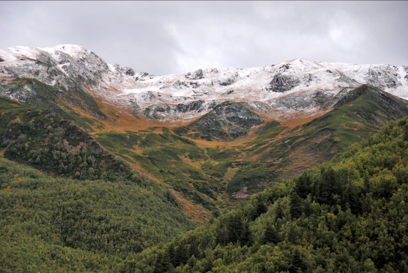 נפת מסטיה